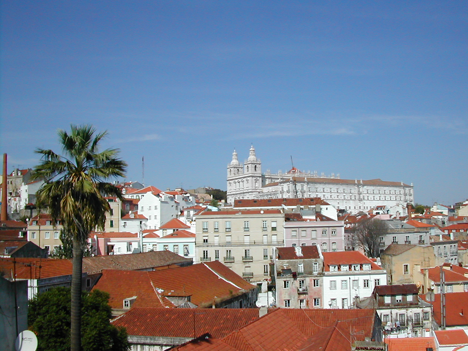 Mosteiro de São Vicente de Fora, Lisboa, Portugal